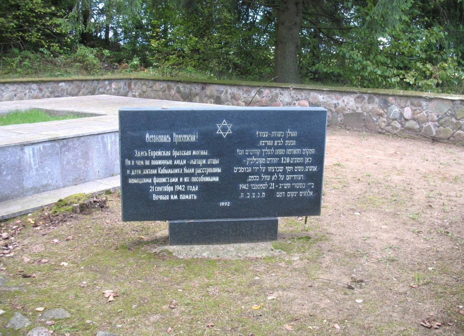 Мемориал на братской могиле в память 120 евреев Кобыльников (Нарочь), убитых на этом месте 21 сентября 1942 года. Находится по дороге на Вильнюс у католического кладбища. Установлен в 1992-1994 годах евреями из Израиля, выходцами из Кобыльников, под руководством Меера Свирского.